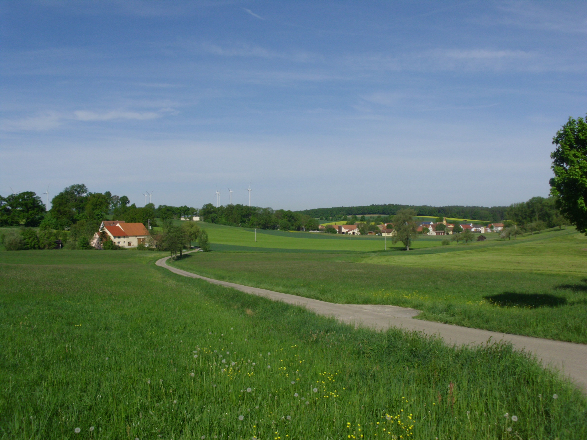 Simonsmühle (Ortsteil von Gnotzheim) und Nordstetten (Ortsteil von Gunzenhausen) im mittelfränkischen Landkreis Weißenburg-Gunzenhausen